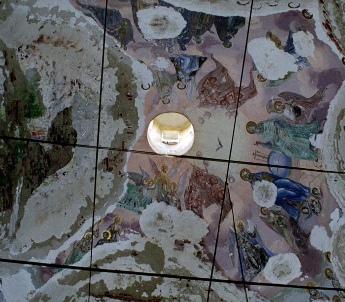 Никольская церковь в урочище Углец, Вичугский р-н. Роспись.